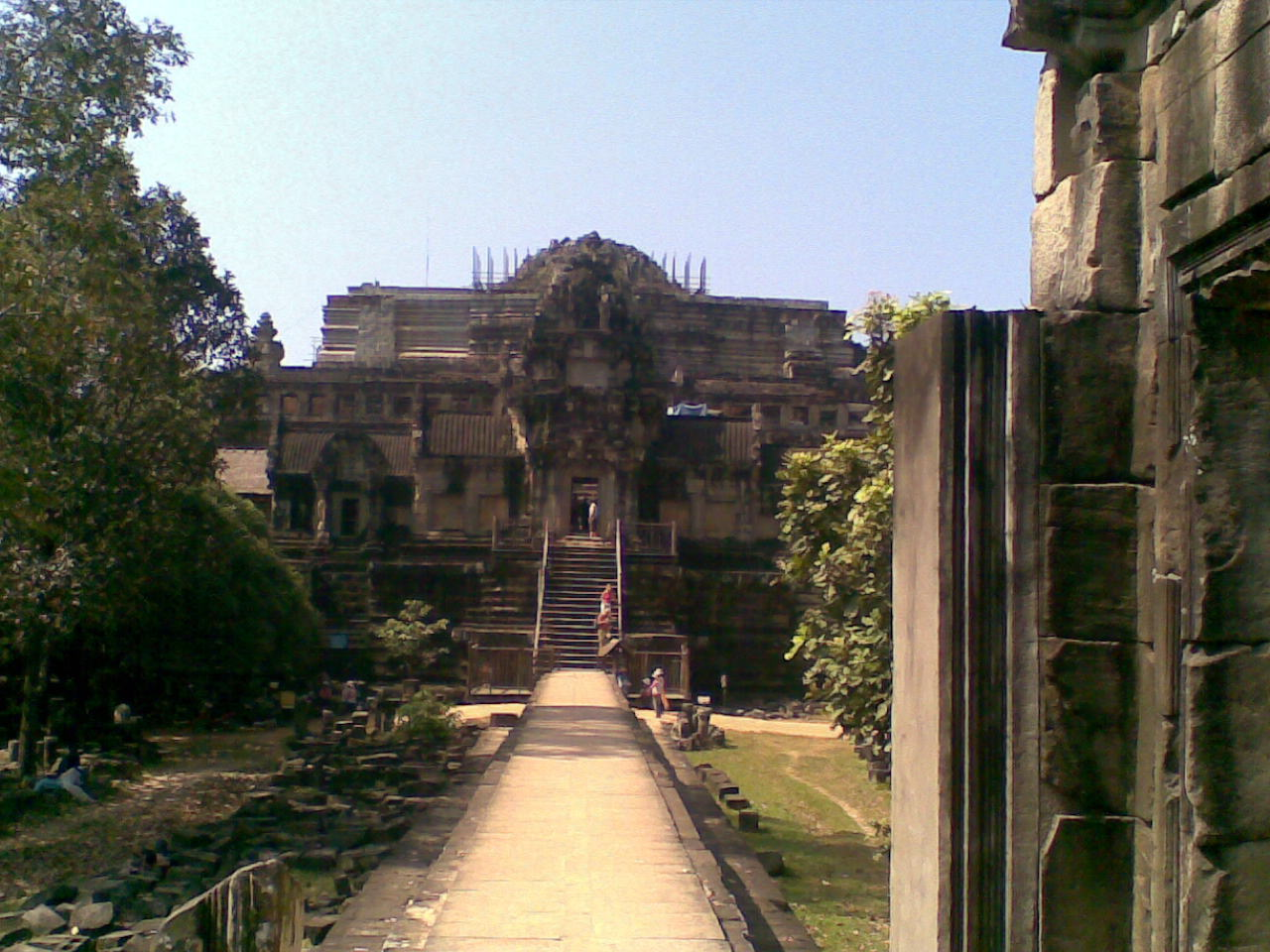 Baphuon chụp từ điện thoại di động Nokia 6300, khó khăn lắm mới chụp được ảnh này vì Baphuon đang trùng tu